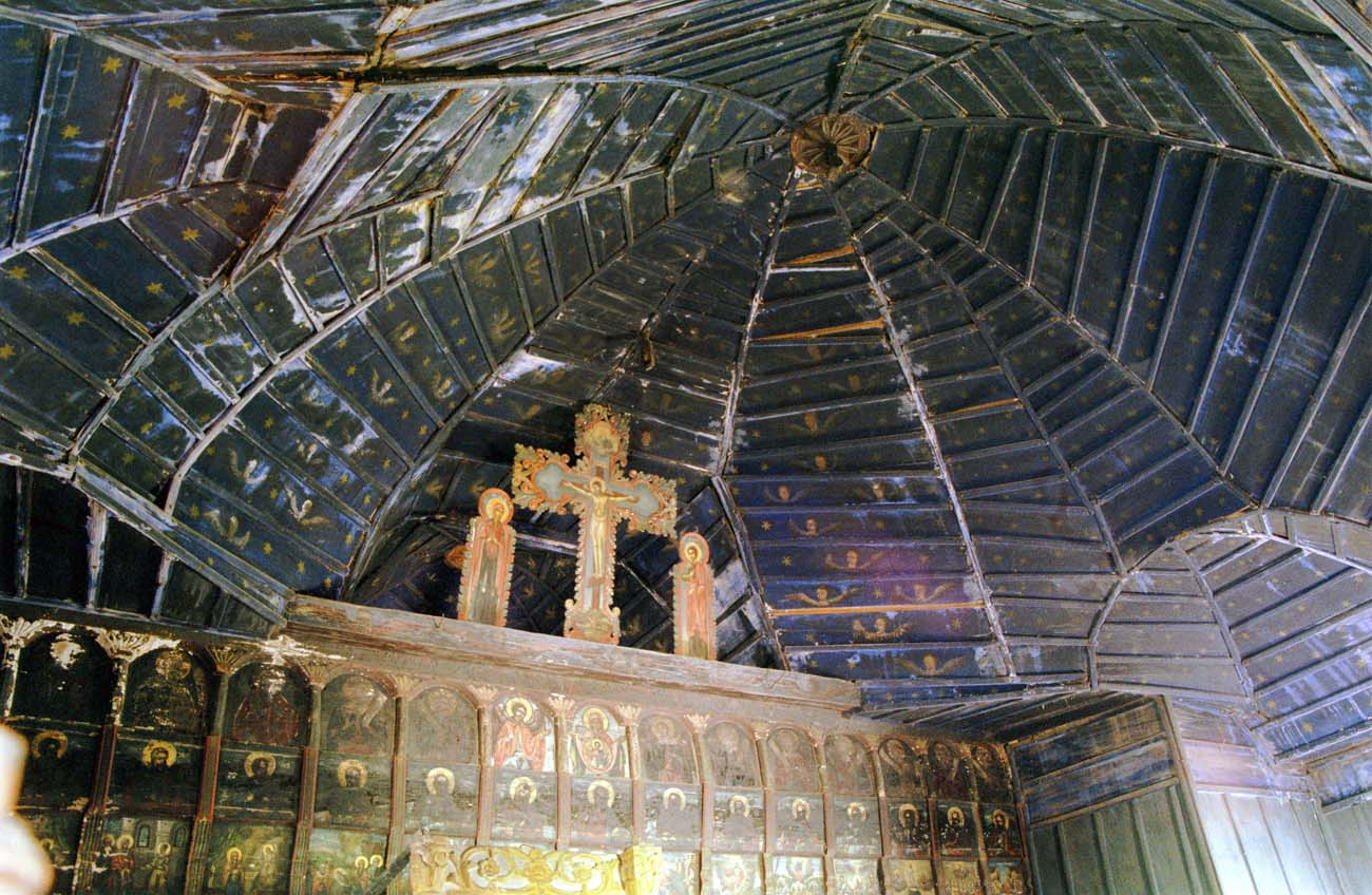 Miroslovești, Iași: biserica de lemn, interior, cupola de peste navă.